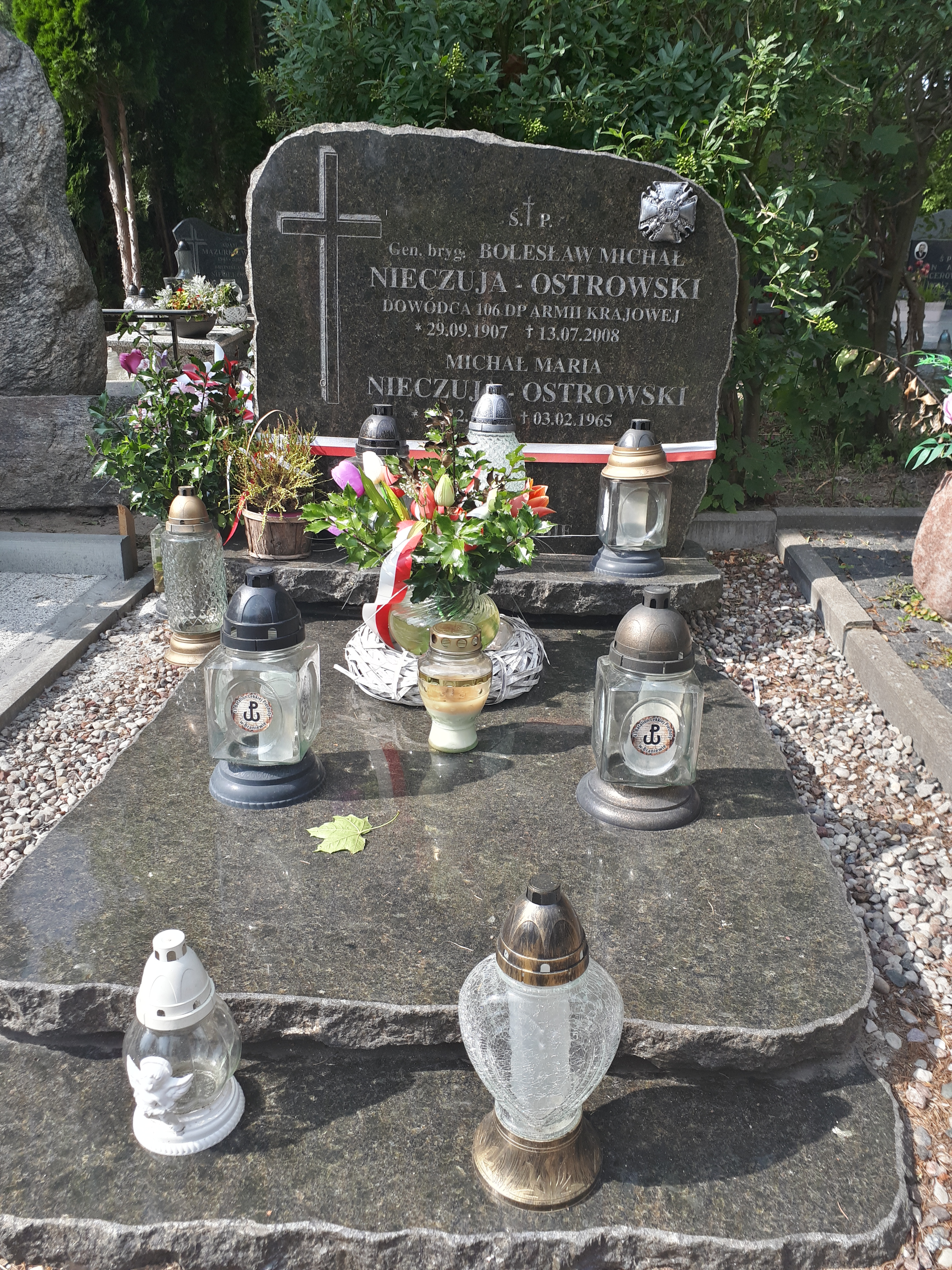 Grób gen. Bolesława Nieczui - Ostrowskiego na Cmentarzu Komunalnym Agrykola